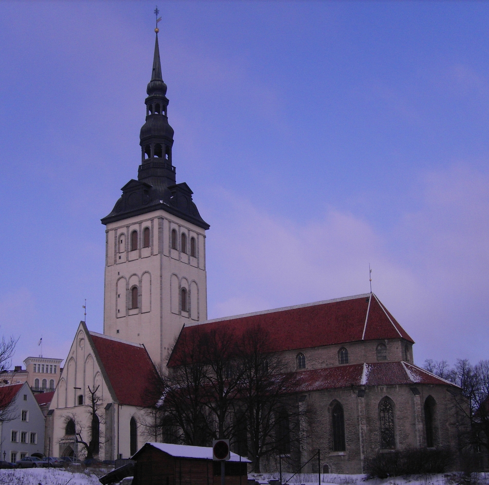 Niguliste Kirik (Nikolaikirche Tallinn)